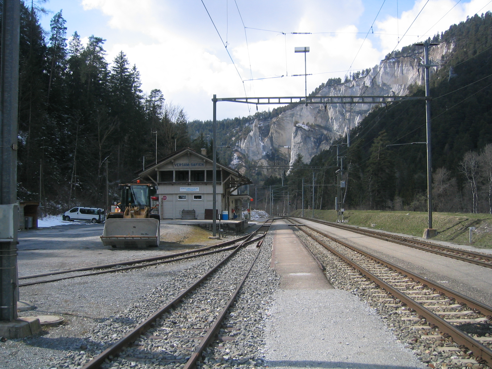 Railwaystation Versam Safien Switzerland